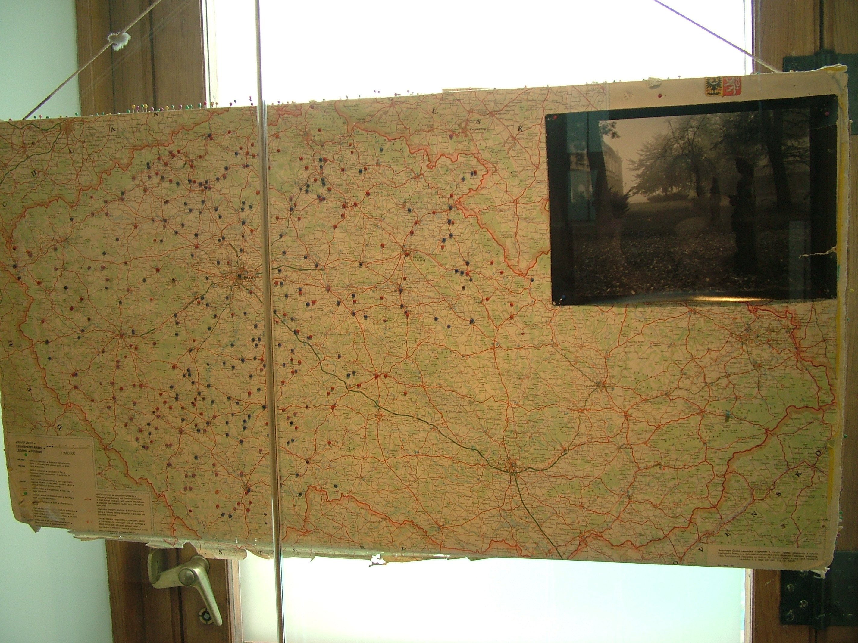 „Jan Reich – Fotografie: Životní příběh fotografa narozeného roku 1942 v Praze“, výstava fotografií, Datum konání: 25. 4. 2012 - 19. 8. 2012 Místo konání: Tereziánské křídlo Starého královského paláce